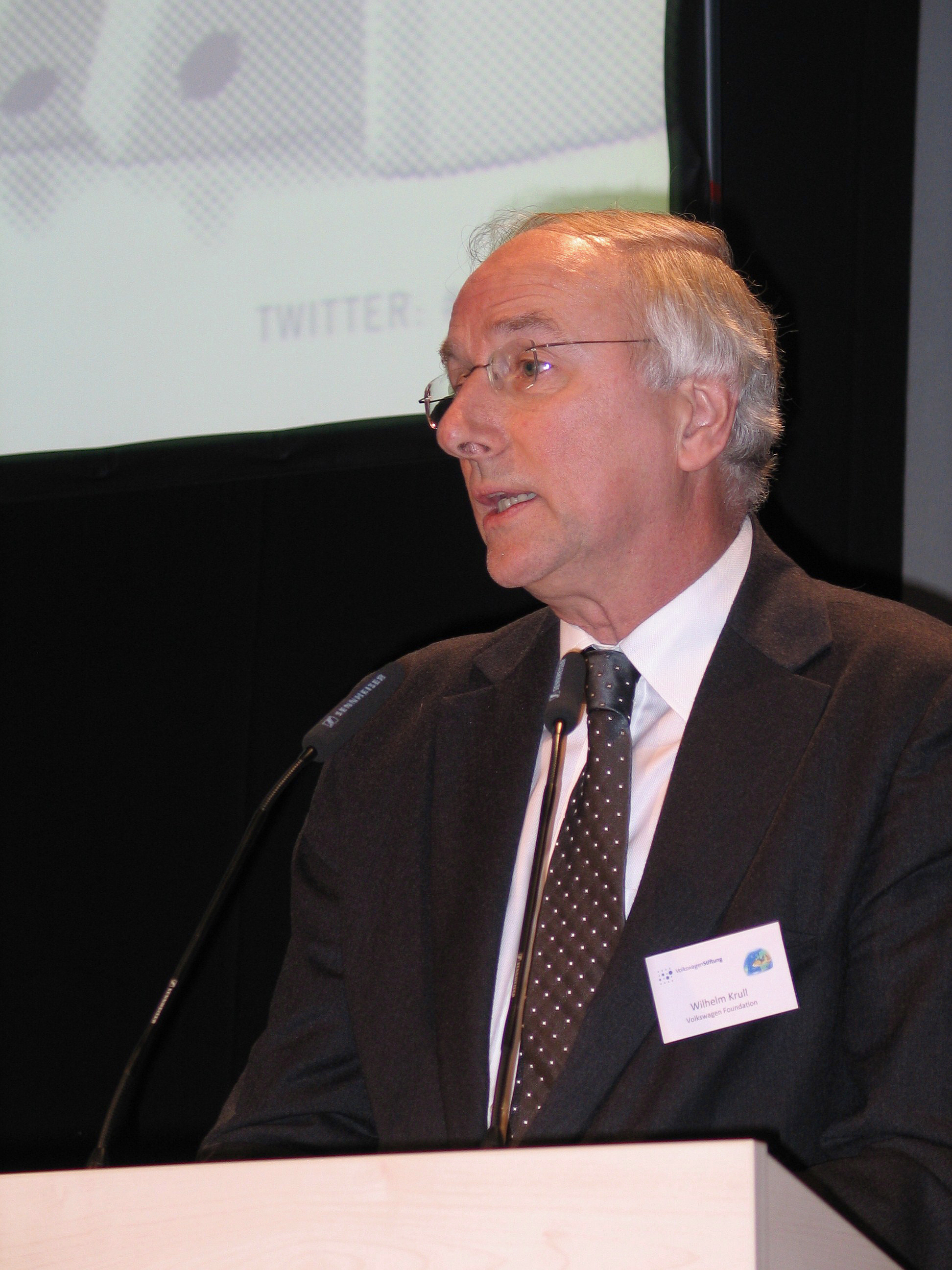 Wilhelm Krull from the second day of the Herrenhausen Symposium Already Beyond? - 40 Years Limits to Growth, organized by VolkswagenStiftung in the Gallery building of Herrenhausen Gardens in Hanover ...